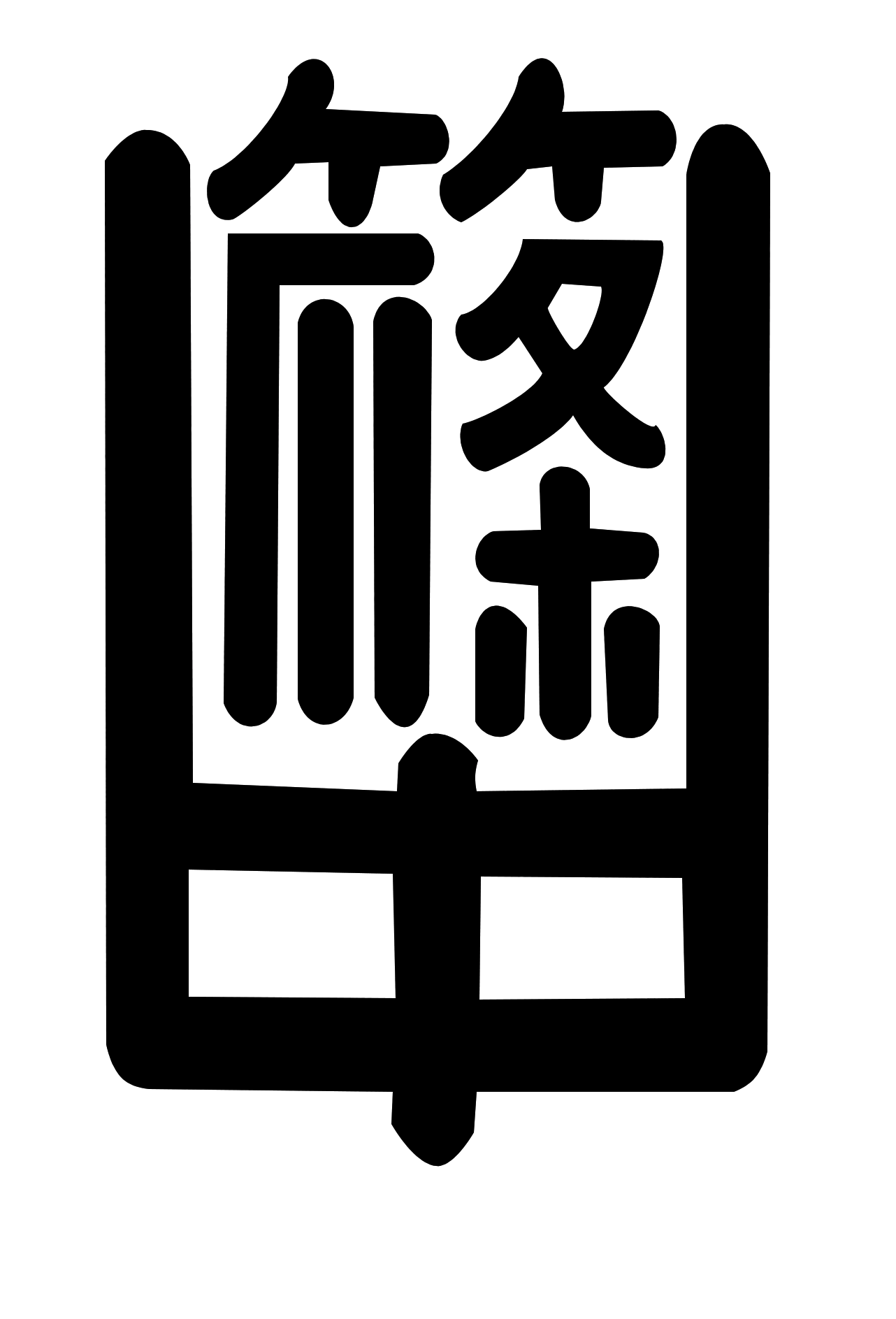 篠津中学校の校章